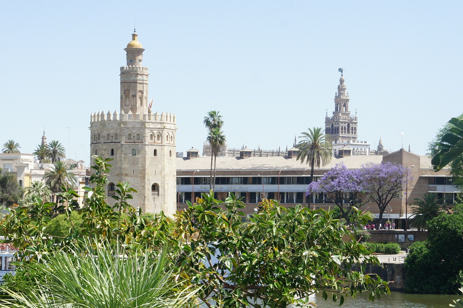 Los Almohades establecieron la capital de Al-Ándalus en Sevilla